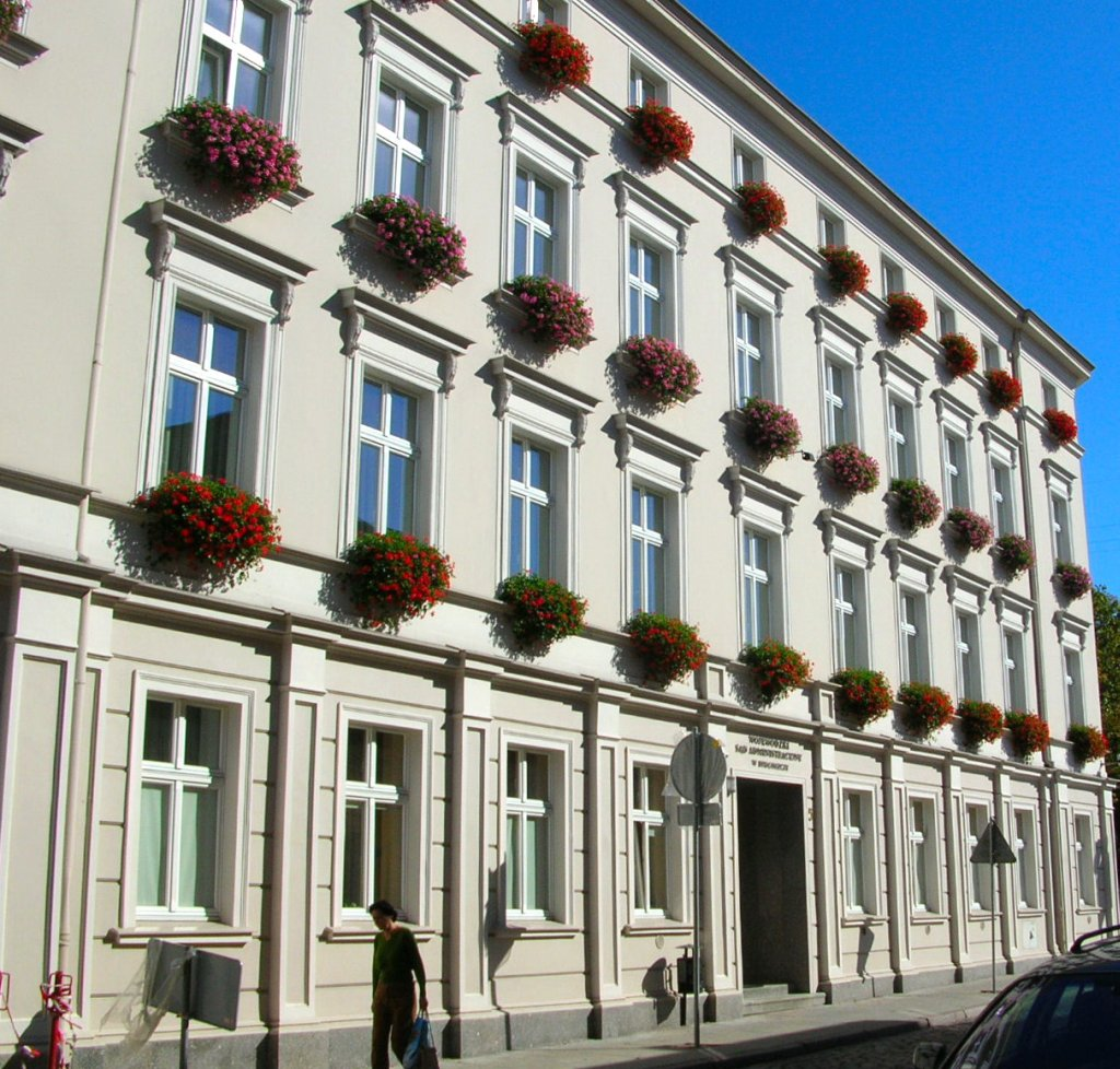 Wojewódzki Sąd Administracyjny w Bydgoszczy, ul. Jana Kazimierza 5, róg Długiej